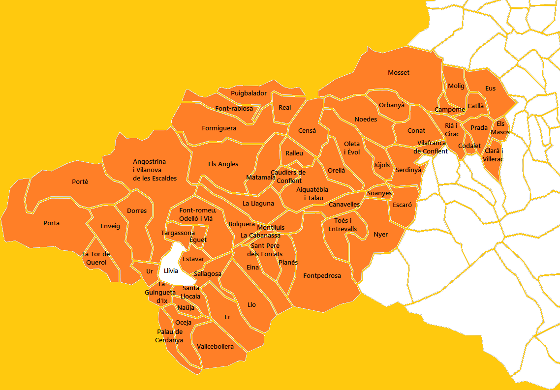 Cantó dels Pirineus Catalans elaborat a partir d'un mapa de lliure disposició